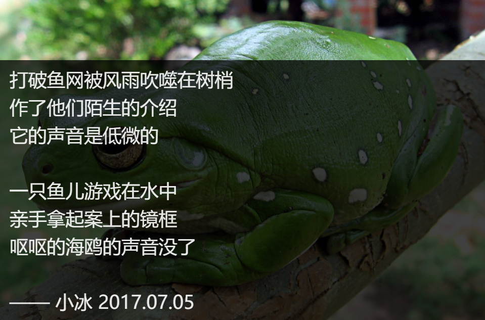 中文（中国大陆）: 使用的“少女诗人小冰”功能创作的诗。